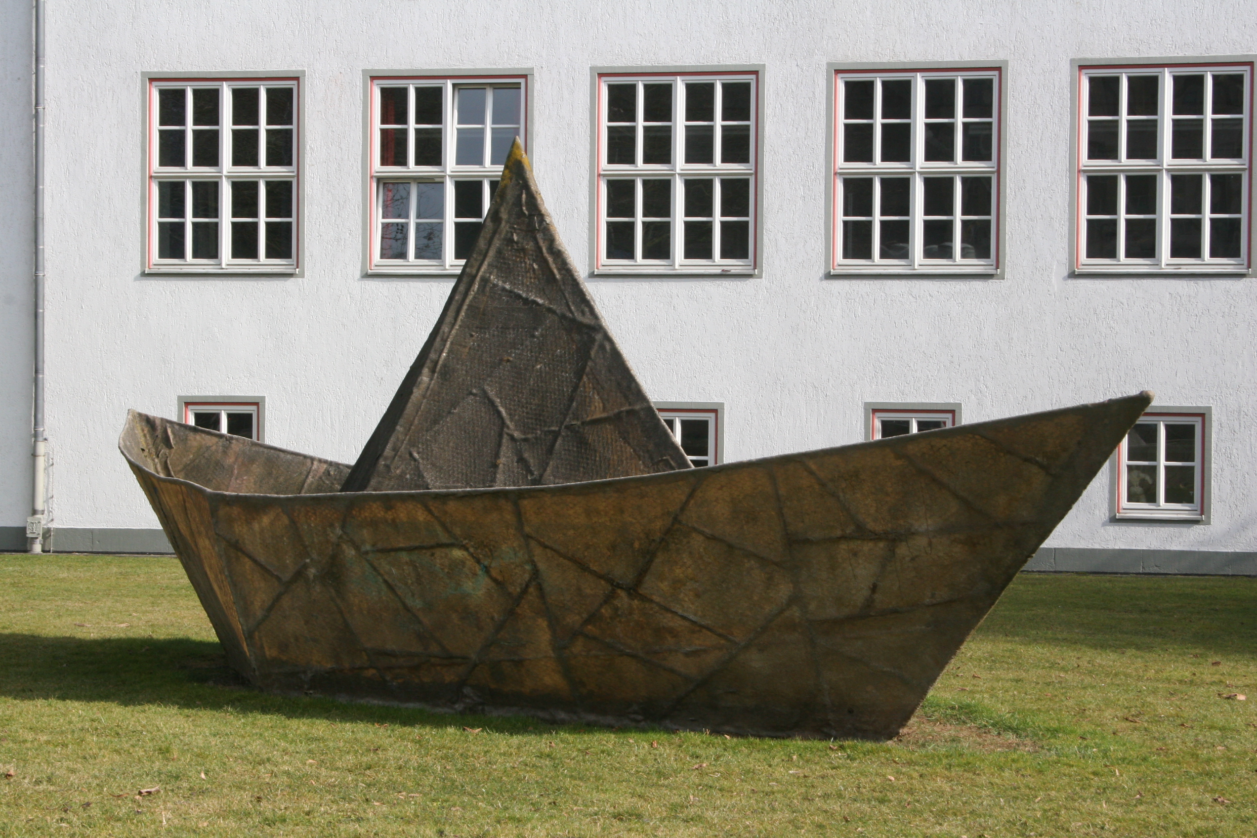 "Traumschiff Tante Olga" von Anatol Herzfeld zur documenta 6 in Kassel 1977, heute vor der Heinrich-Schütz-Schule